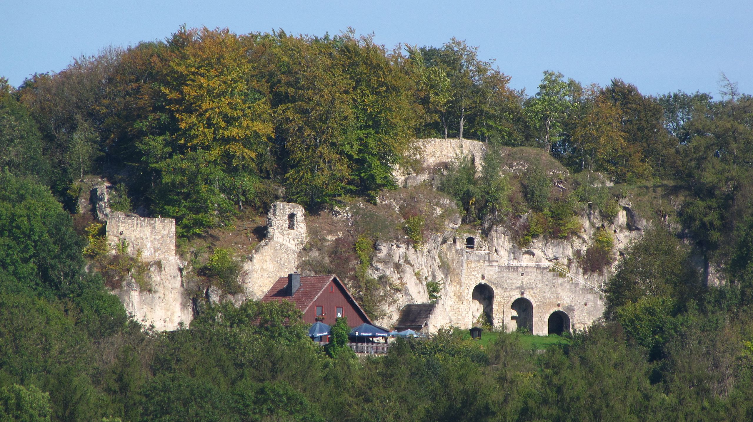 Blick auf die Ruine Scharzfels vom Bühberg oberhalb von Barbis